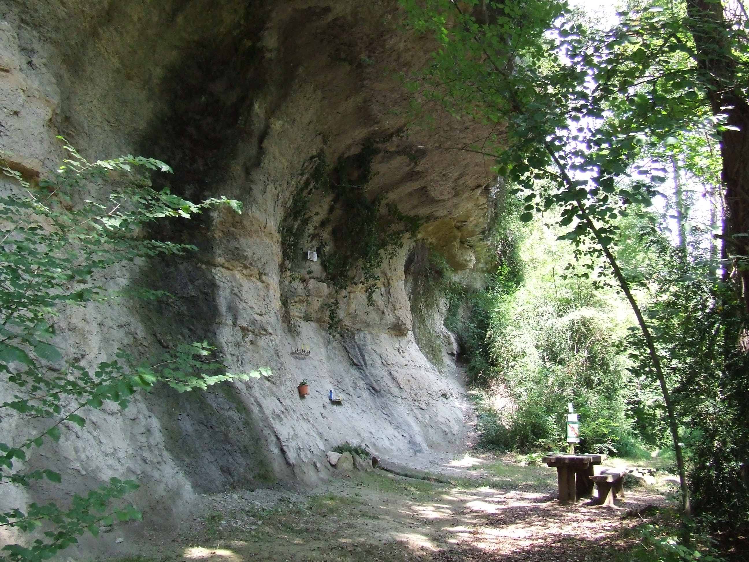 La bauma de Fontscalents (Castellcir, Moianès)